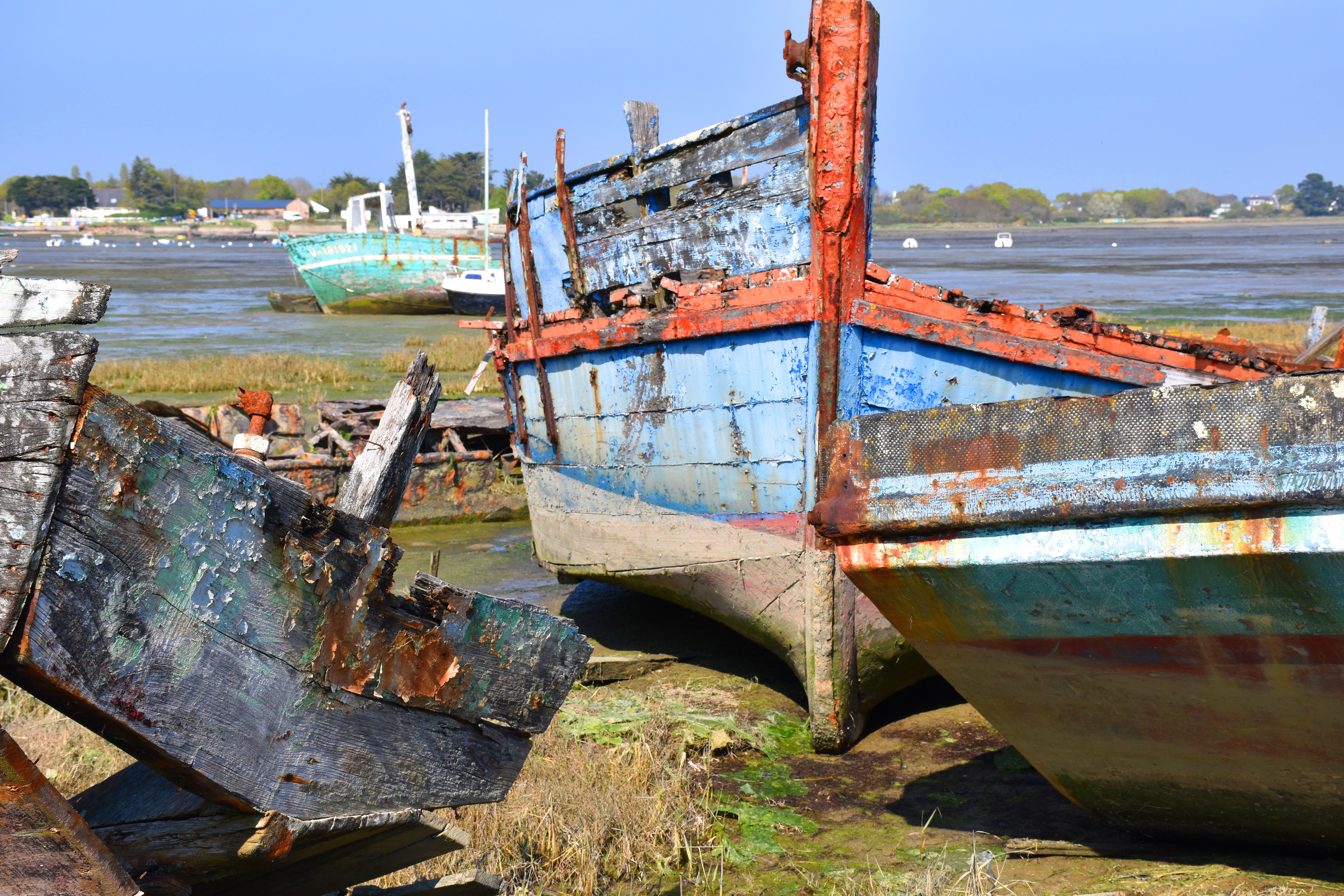 Cimetière de bateau de l'Ile de Boëd, en Séné.